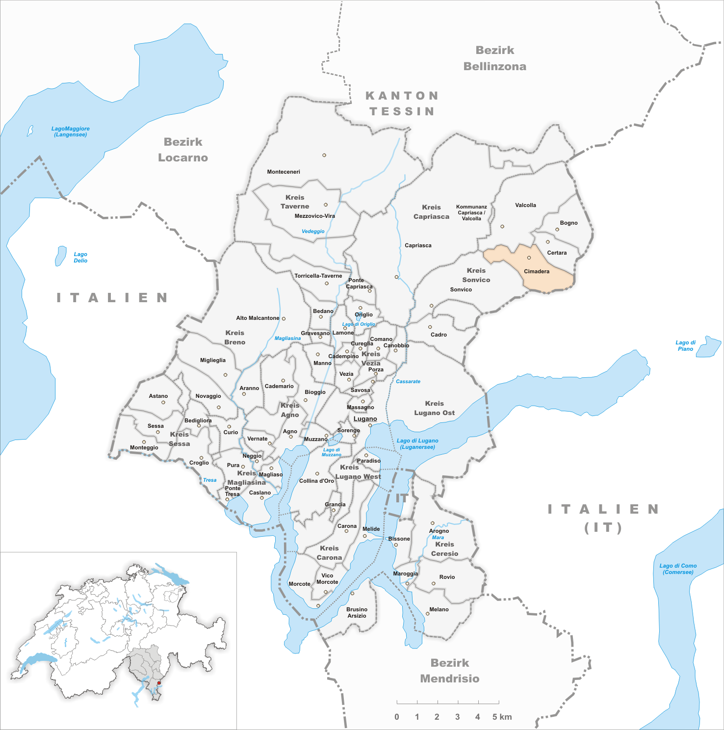 Municipality Cimadera